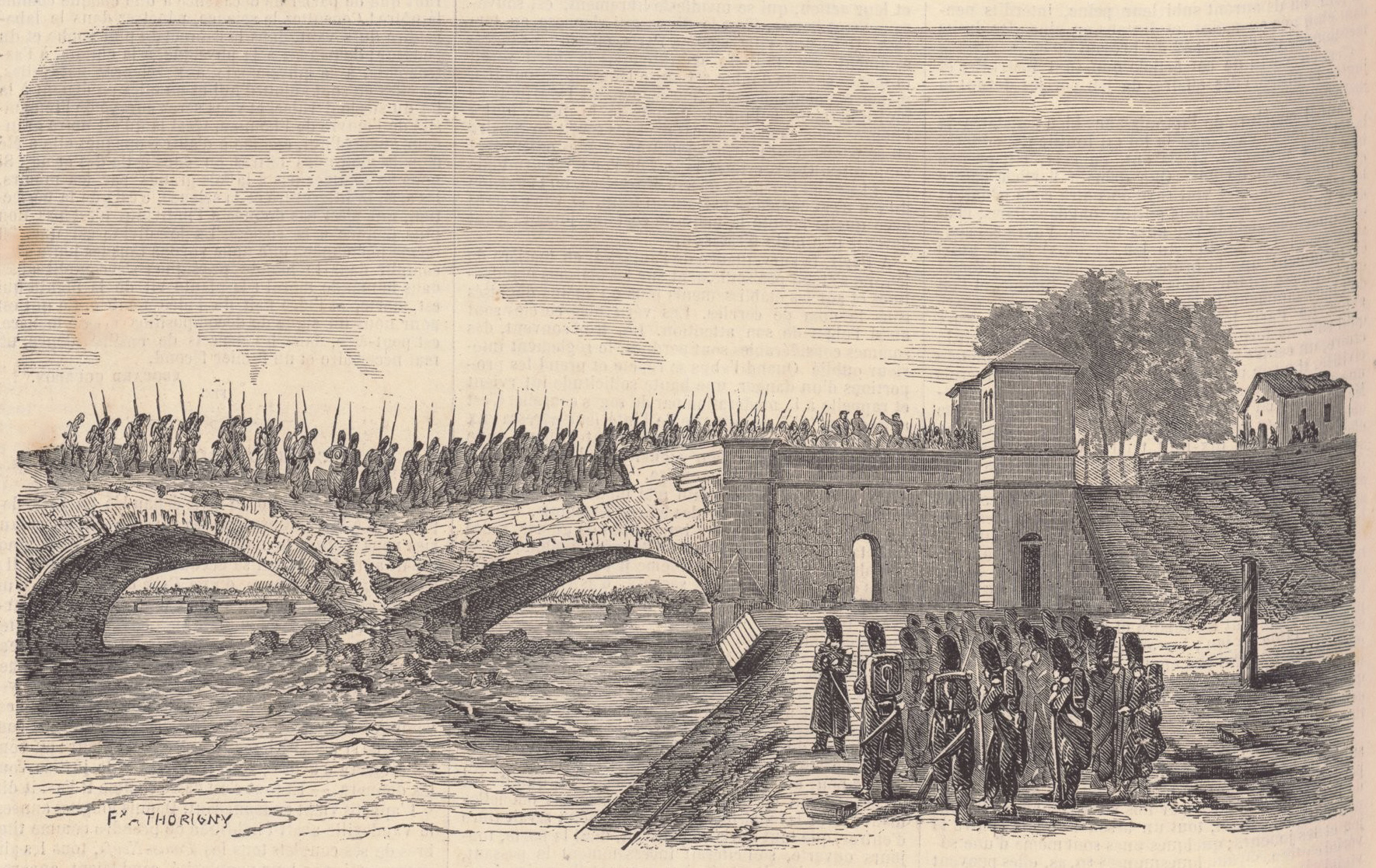 Boffalora sopra Ticino, 3 giugno 1859 - ore 12 c.a. Il 2º Reggimento granatieri del Colonnello D'Alton passa il semidistrutto ponte sul Naviglio Grande. All'estrema destra è raffigurata da casa divenuta osservatorio di Napoleone III per la battaglia di Magenta. Litografia ridotta e modificata.